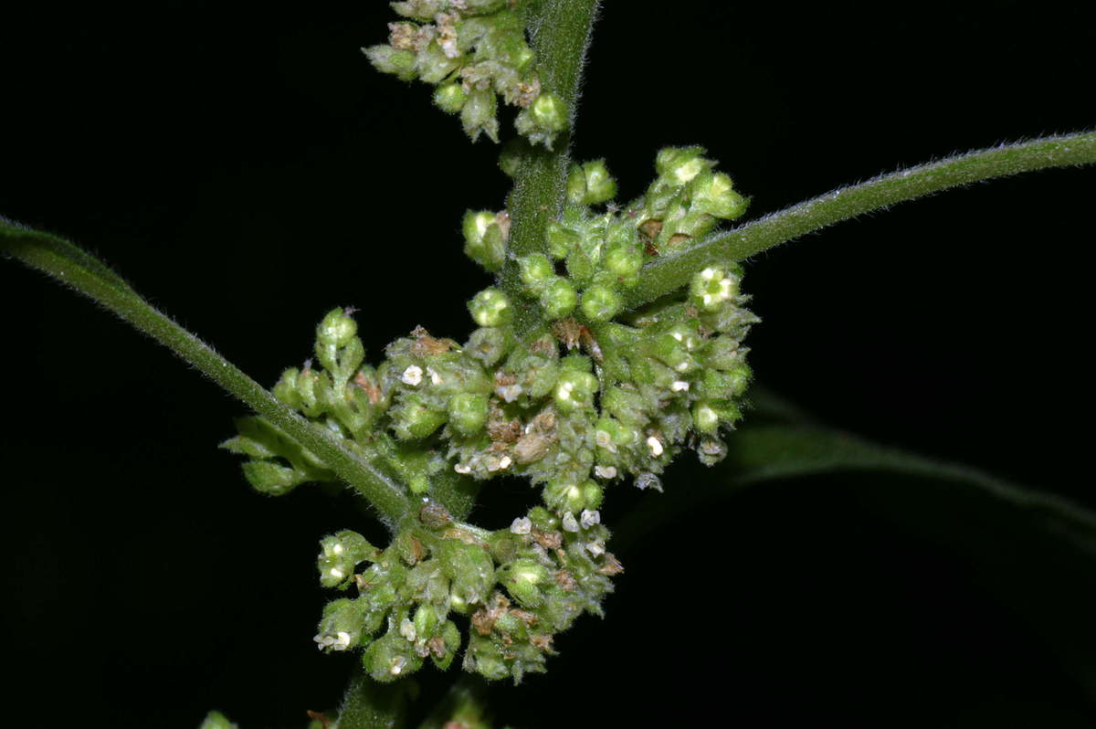 Navadna krišina v Čolnišču.